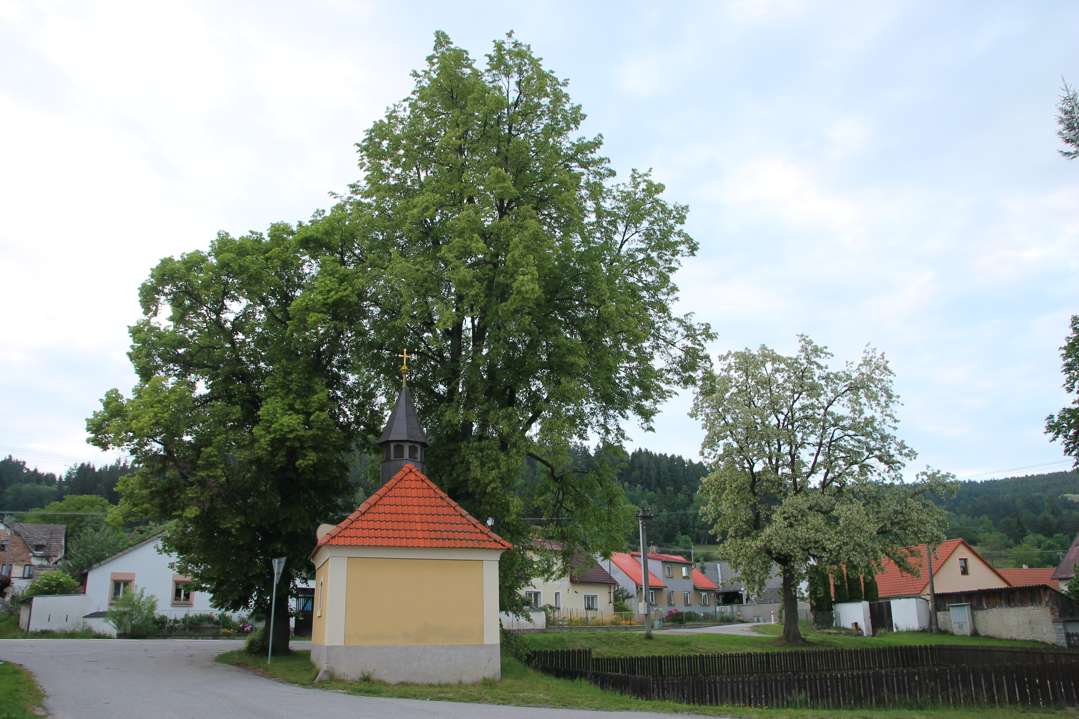 Dolany, Čkyně, kaple